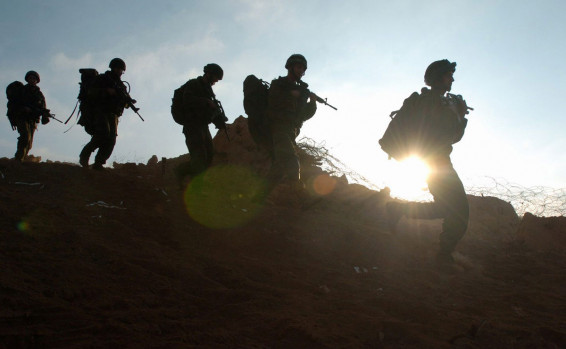 מבצע שינוי כיוון: הצנחנים יוצאים מבינת ג'בייל אחרי שחיסלו 26 מחבלי חיזבאללה.